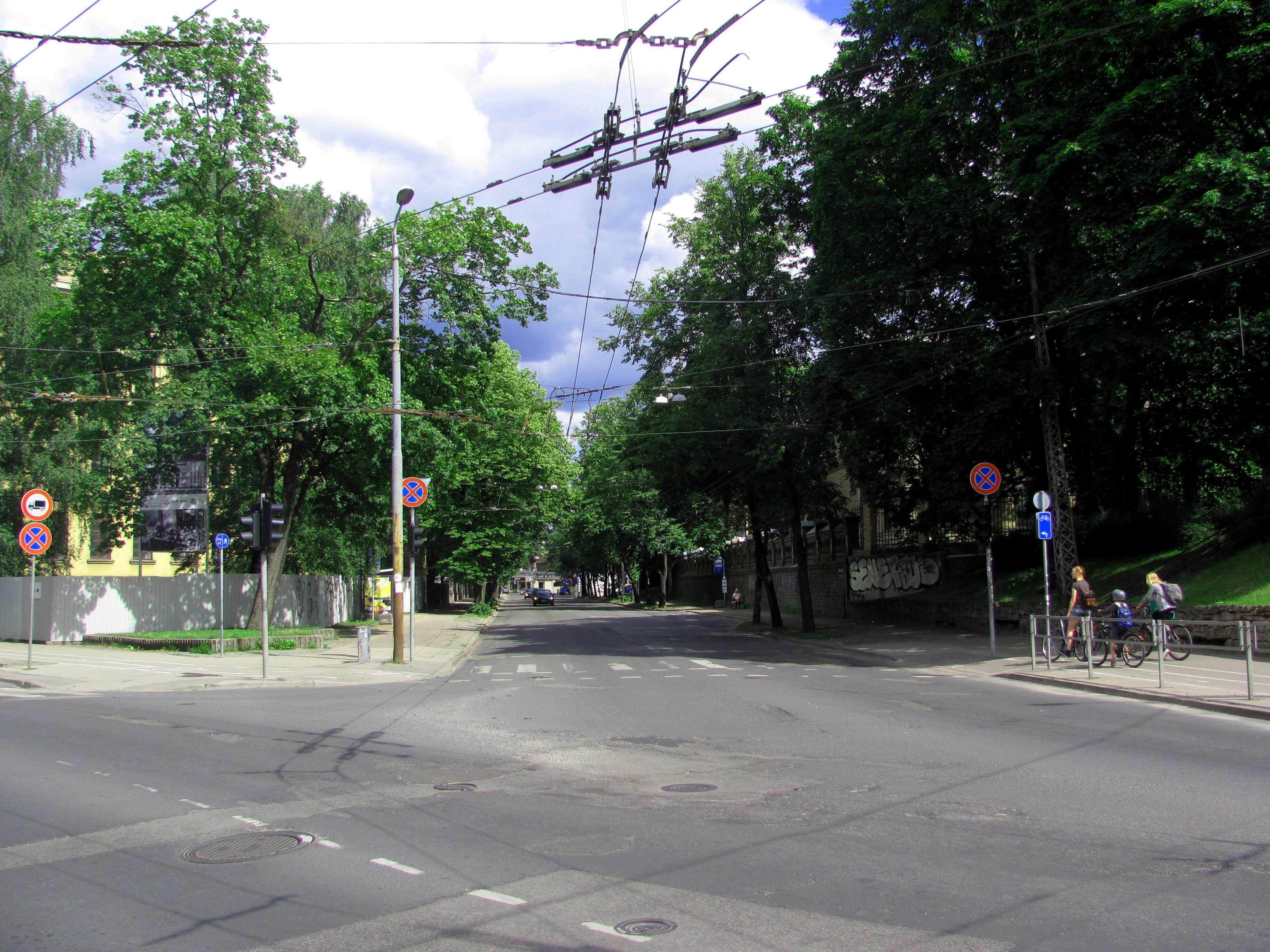 Aristida Briāna ielas sākumposms pie krustojuma ar Krišjāņa Valdemāra ielu. Skats Tallinas ielas virzienā.